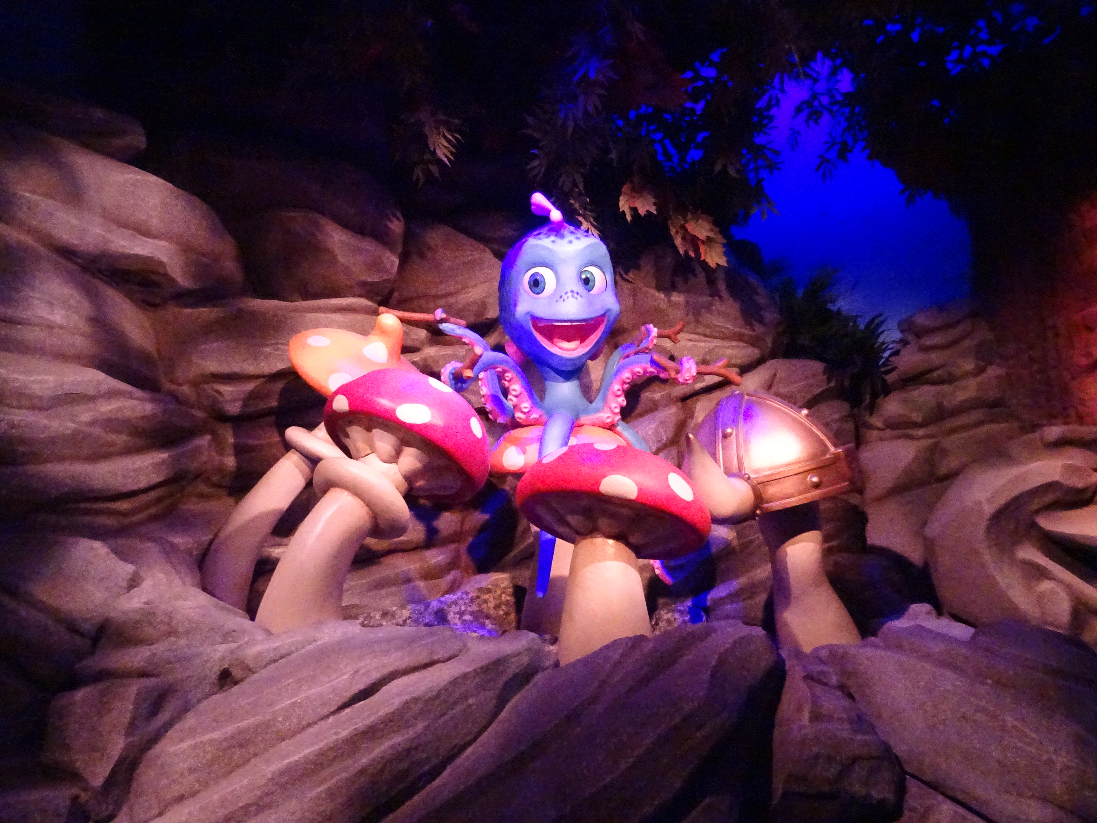 Personnage de Snorri, dans l'attraction Snorri Touren à Europa-Park